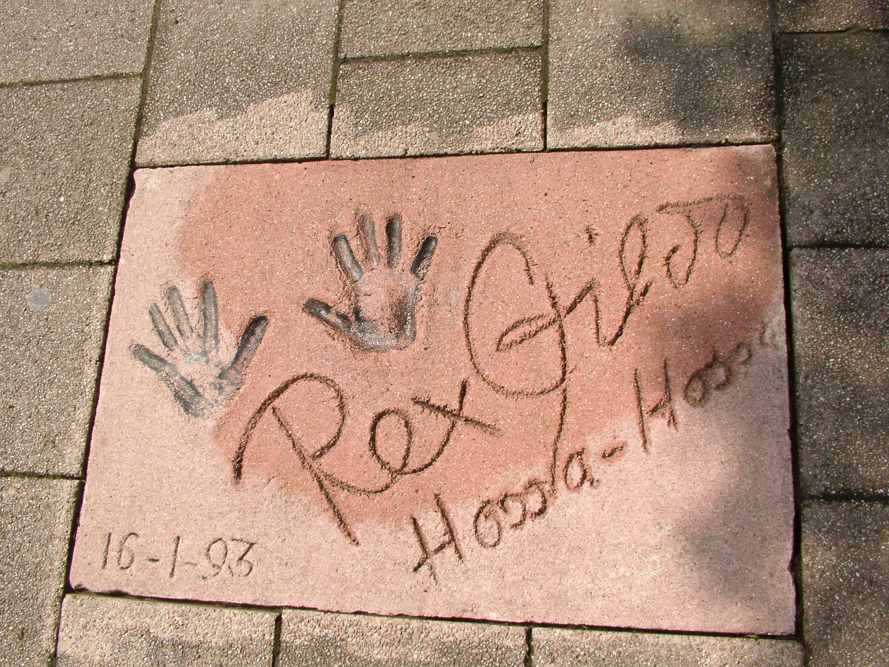 Walk of Fame (Rotterdam), hier: Rex Gildo